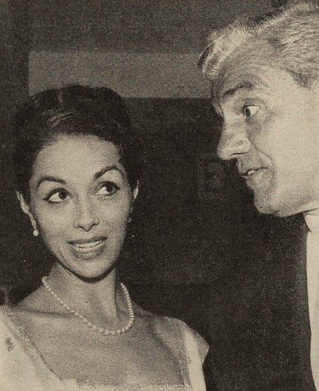 Dana Wynter with Greg Bautzer, April 1959